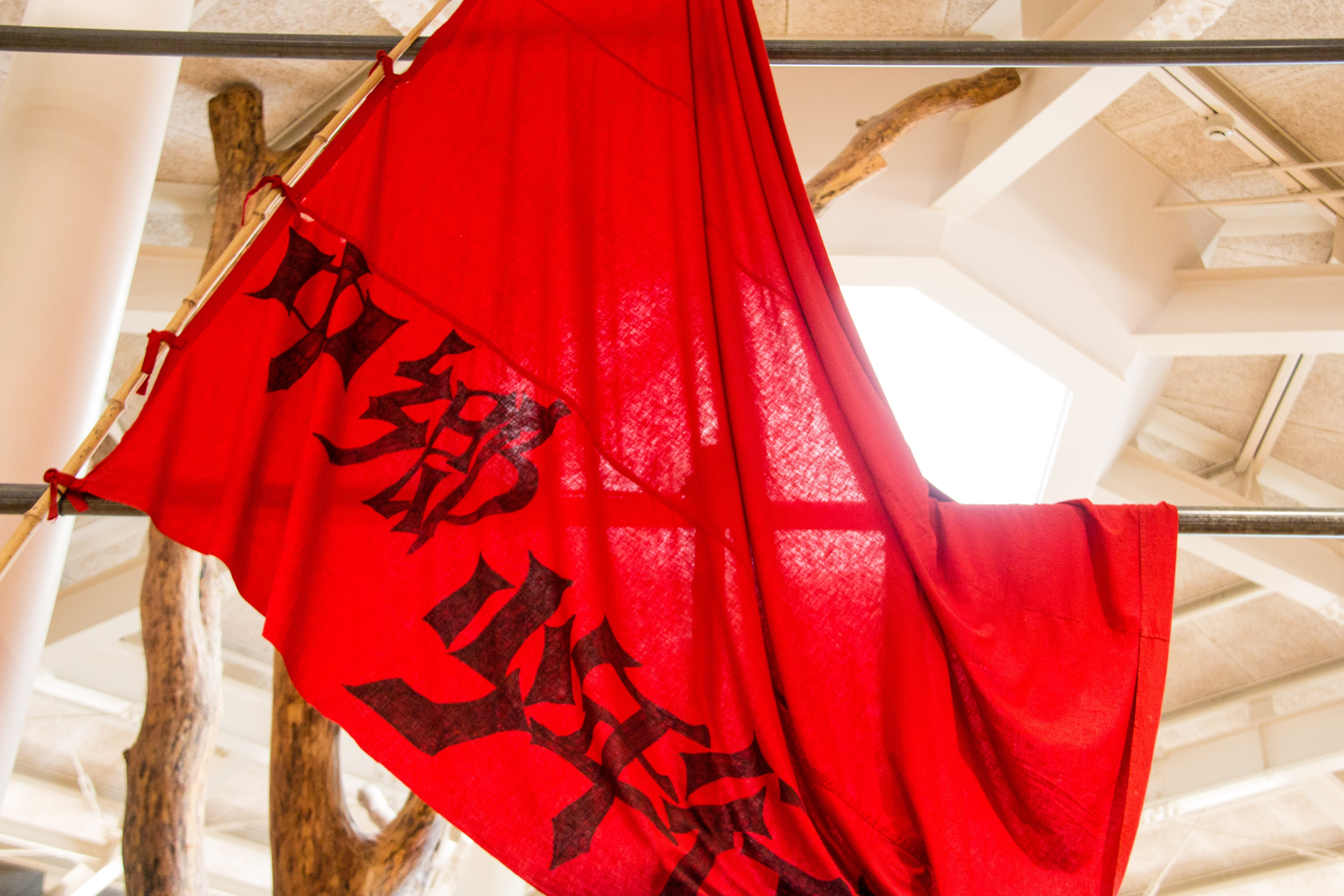 成田空港 空と大地の歴史館にて。少年行動隊旗。